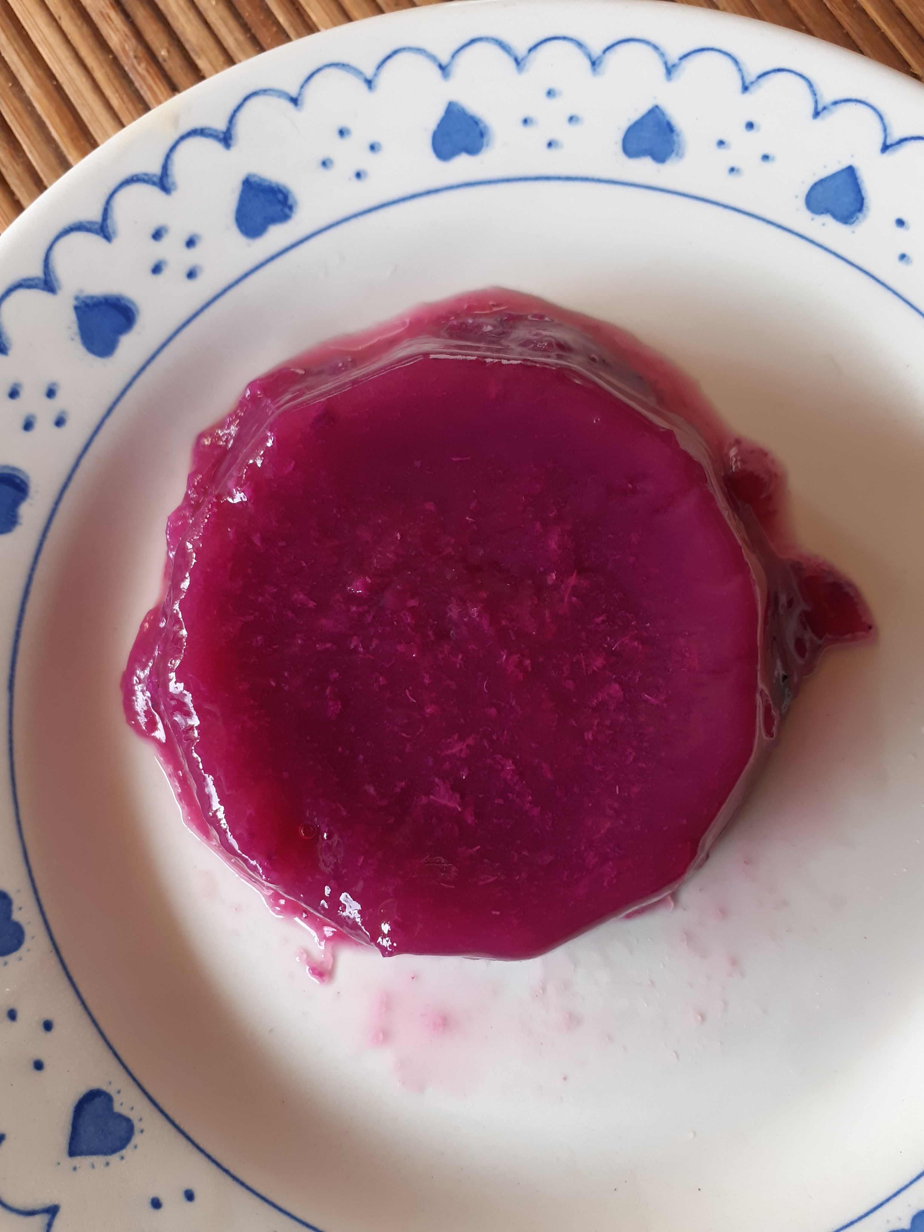 gelée de jamelon, pistas afin d'expliquer le nom familier utilisé pistas en Polynésie lié à la coloration produite par les tannins